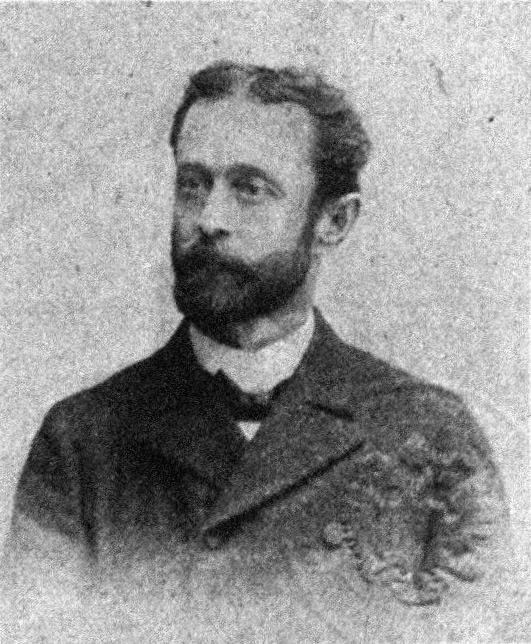 Österreichischer Politiker, Reichsratswahl 1907, Name siehe Dateiname